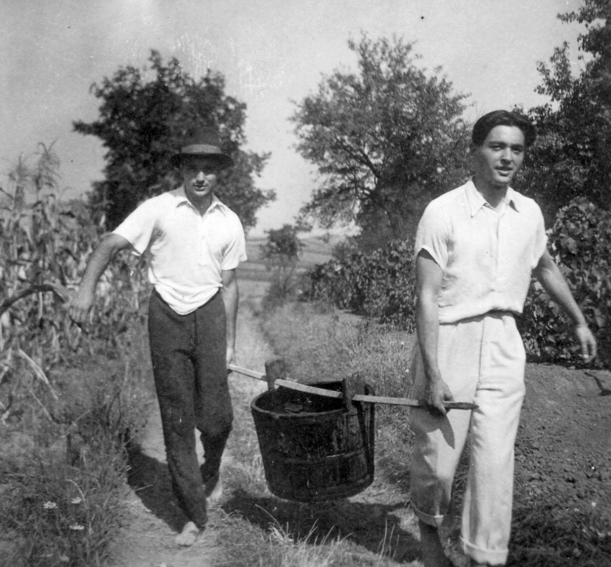 szüret. Location: Hungary Tags: grape, vine hill, vine, harvest, youth, men, hat Title: szüret.